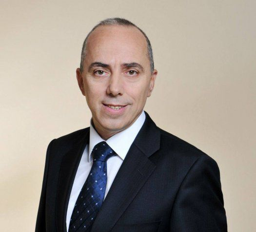 Minister der Infrastruktur Kosovos